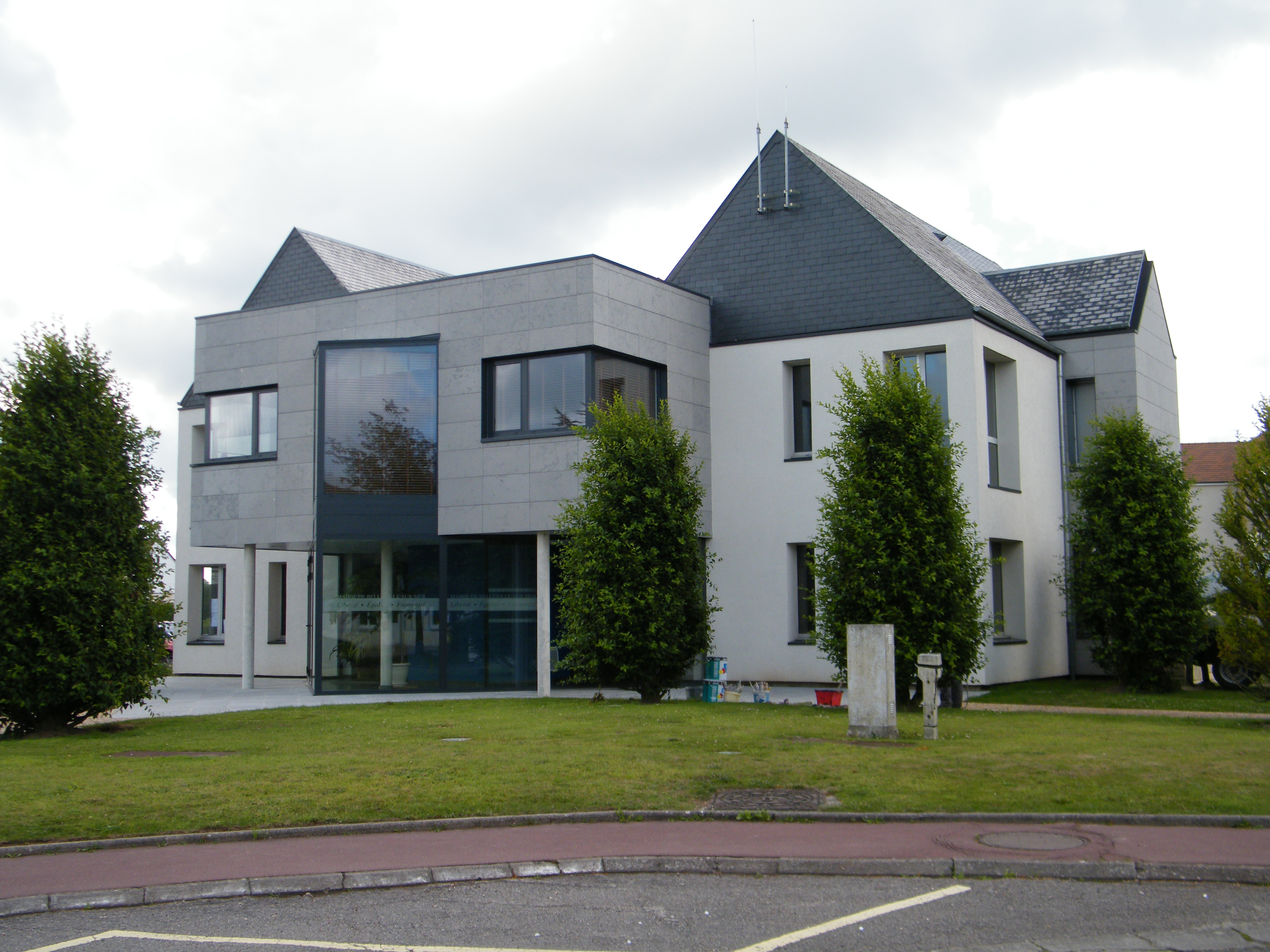 Belleville-sur-Mer, Seine-Maritime, France, mairie